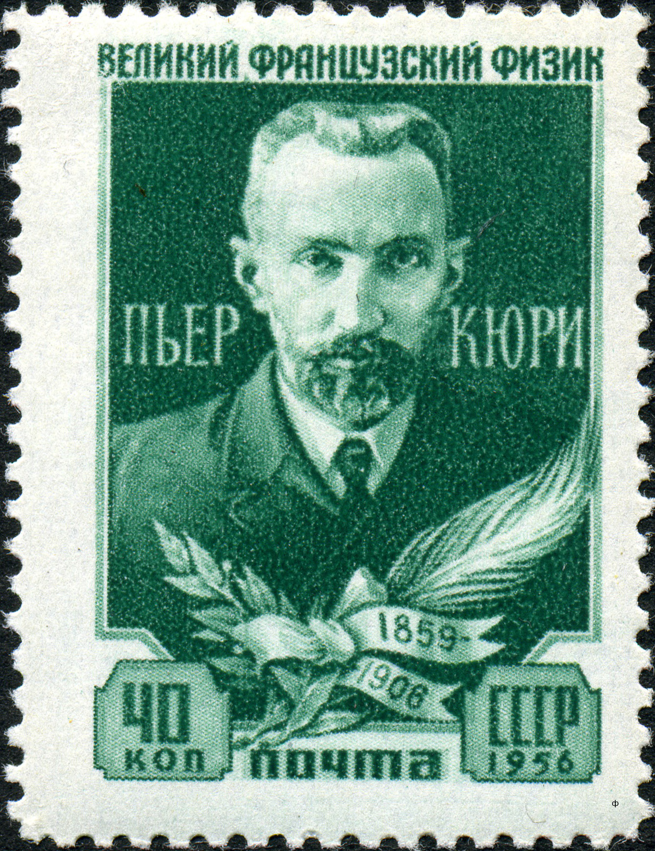 Марка СССР